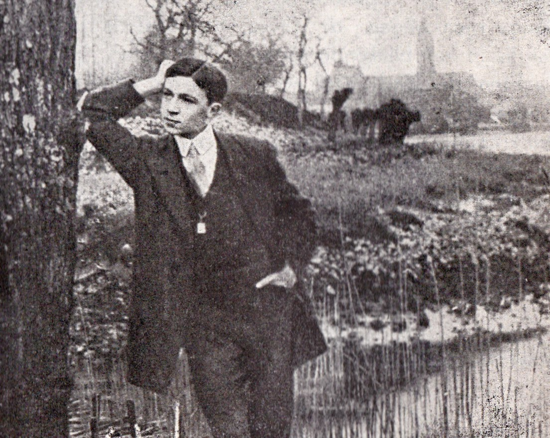 "De jonge dichter Frans van Raemdonck aan de oever van de schelde (1914)"